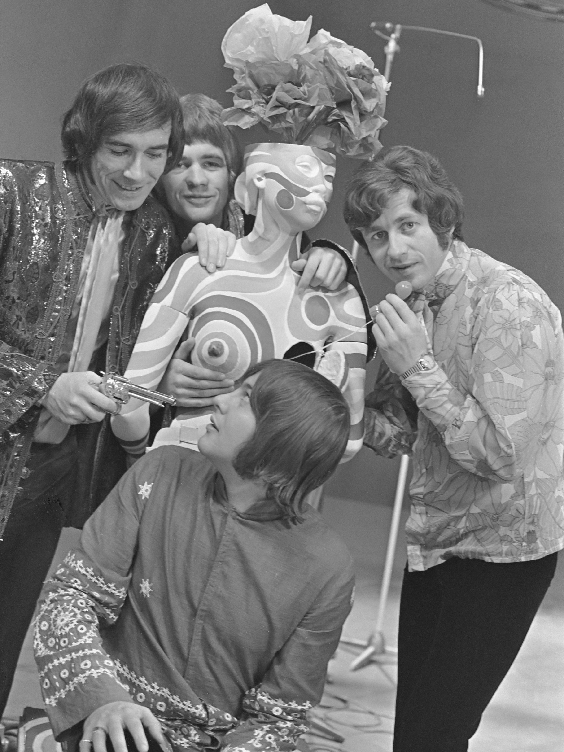 De beatgroep Flowerpot Men zal optreden in het muziekprogramma Fanclub 9 november 1967